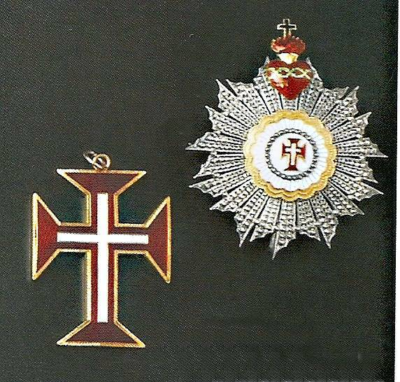 Condecoração do Império do Brasil(1821-1889) - Empire of Brazil Decoration